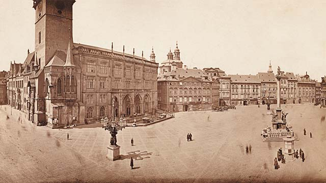 Severozápadní strana Staroměstského náměstí